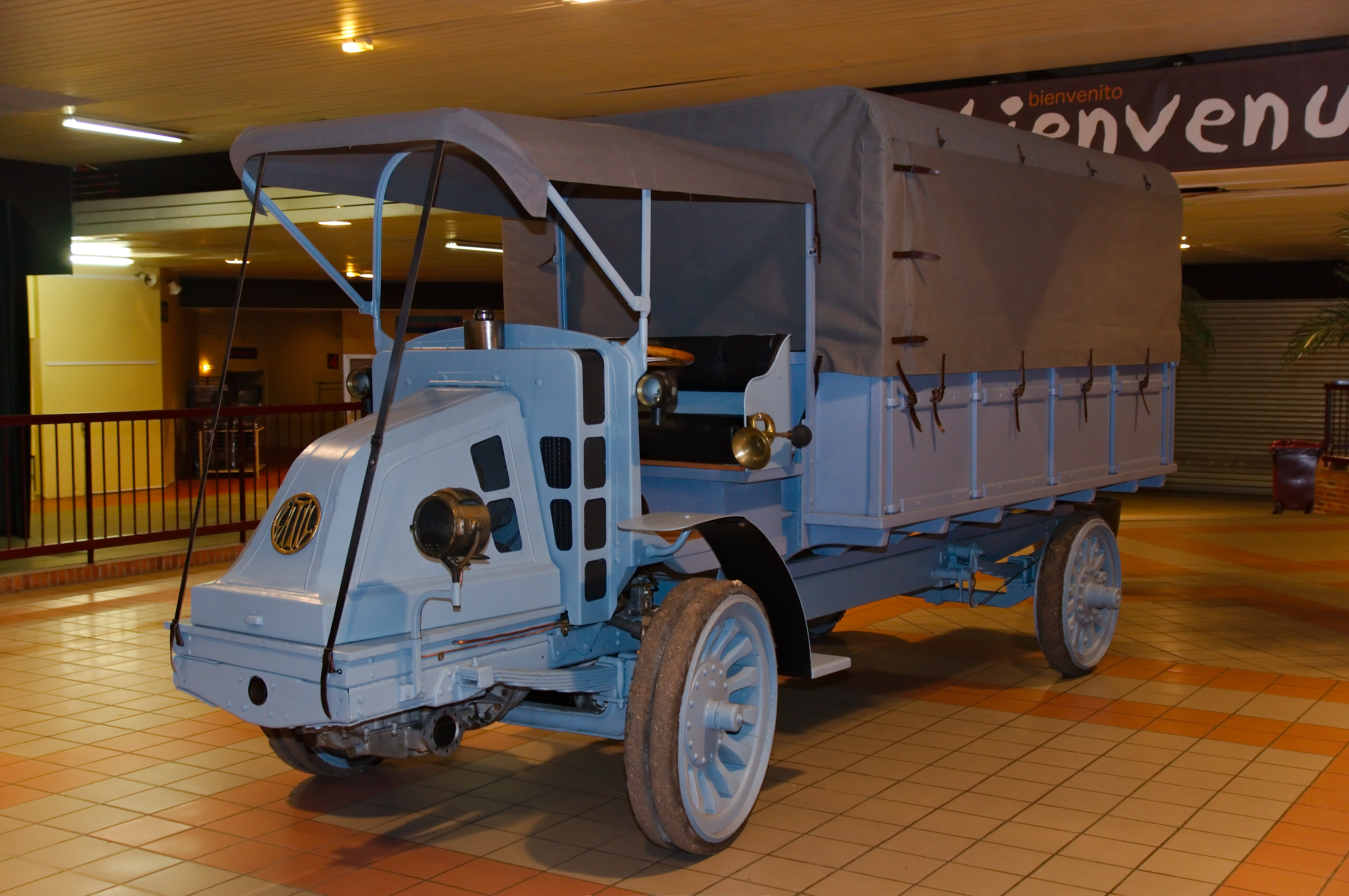 Salon professionnel Niort 2012 au parc expo de Rouen